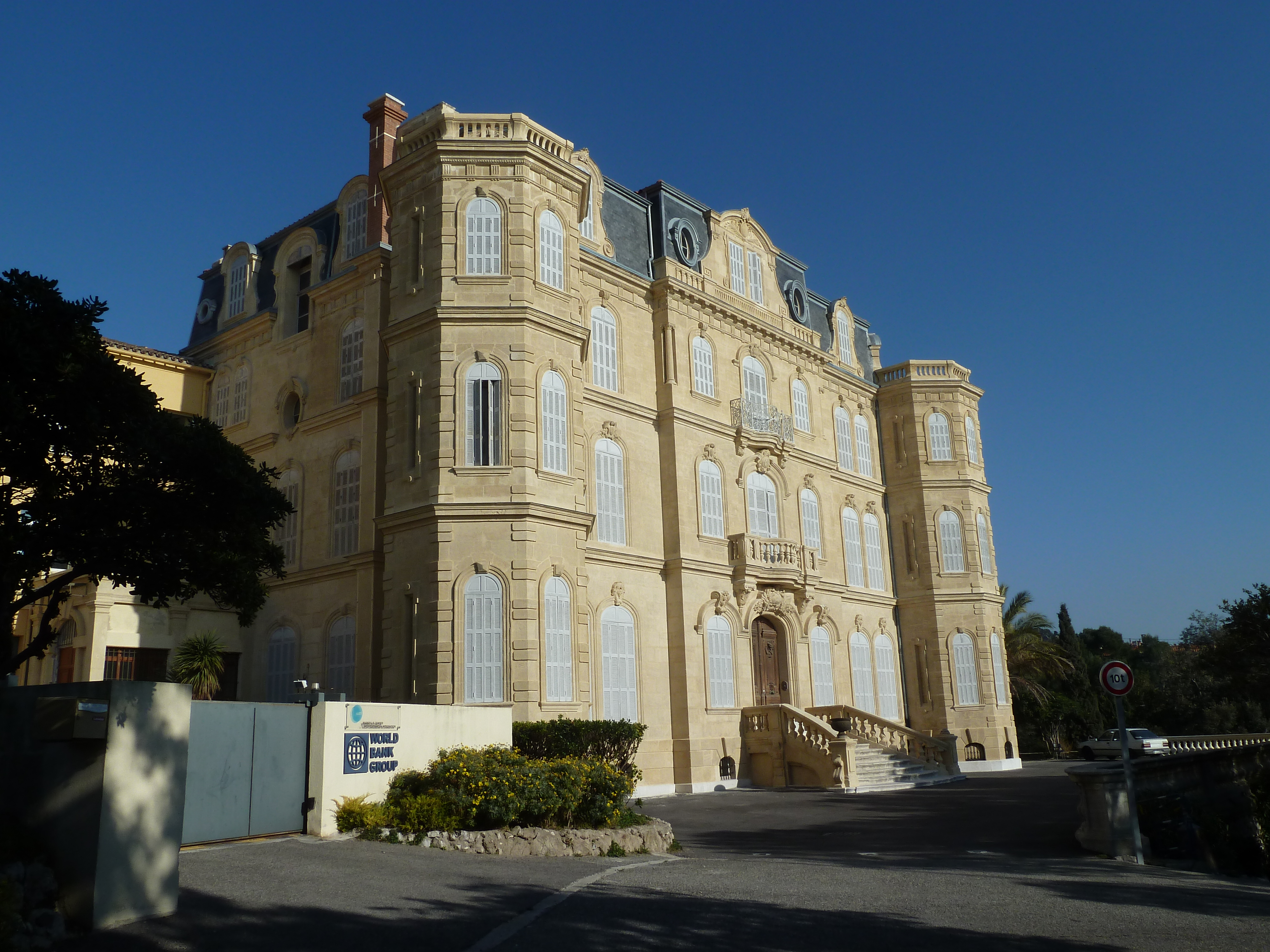 La Villa Valmer à Marseille